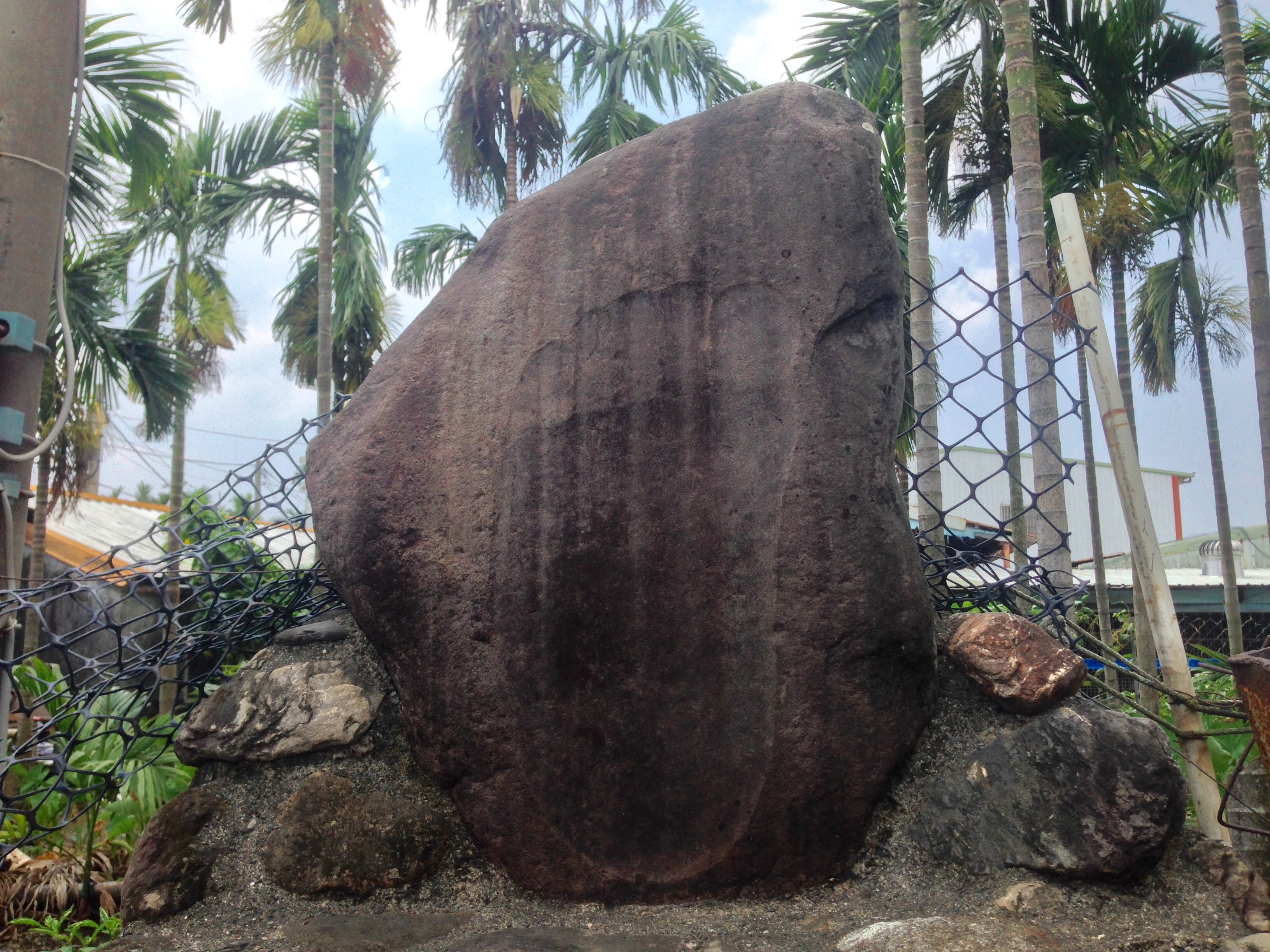 中文（台灣）: 潮州大腳仙林池靈宮前腳印石